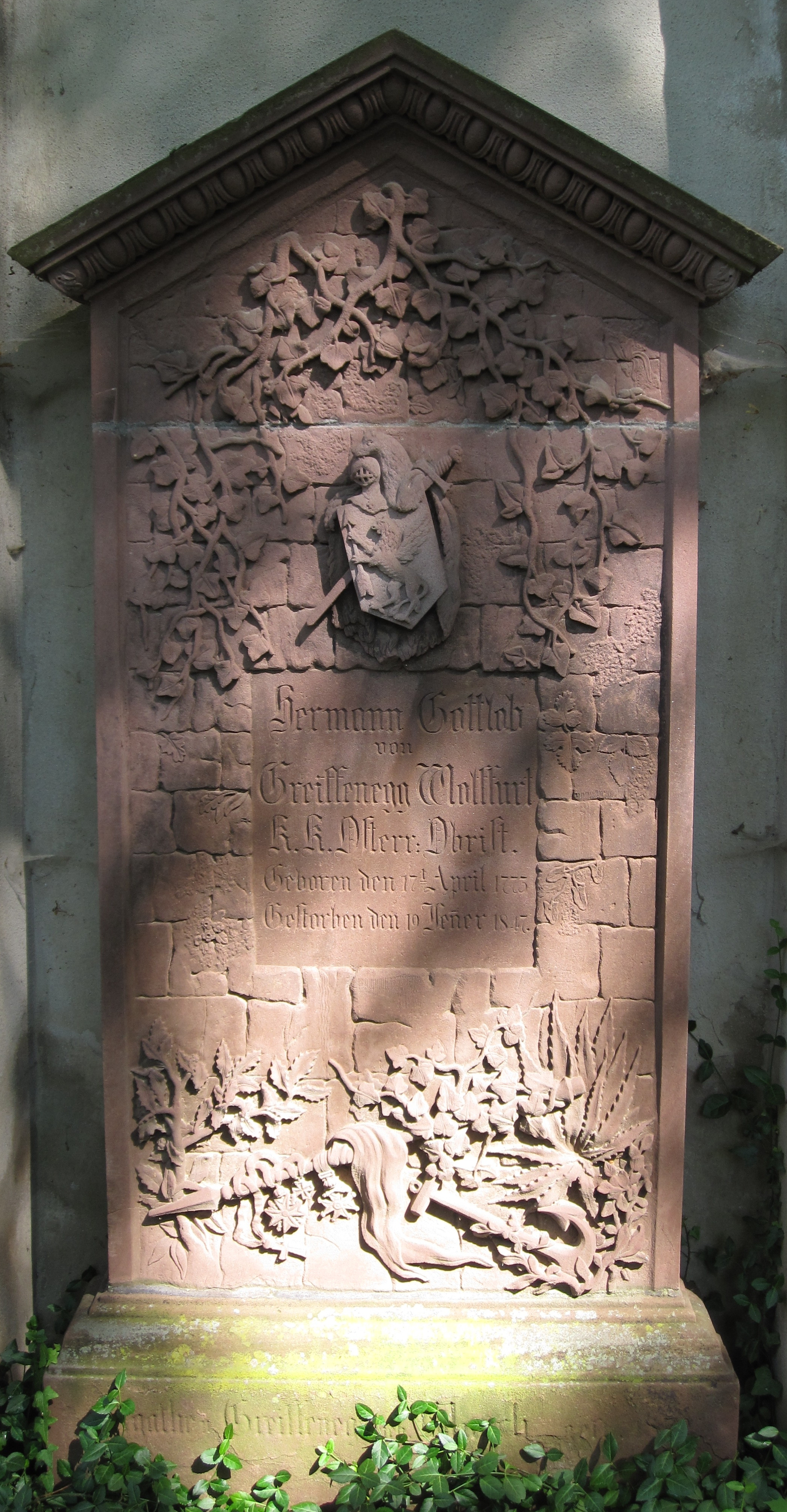 Alter Friedhof (Freiburg)